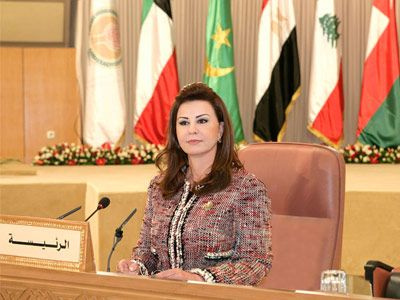 Tunisian first lady Leila Ben Ali presides over a meeting of the Arab Women Organisation in November 2010. [Magharebia/Mona Yahia] Tunisian first lady Leila Ben Ali presides over a meeting of the Arab Women Organisation. دعت منظمة المرأة العربية خلال اجتماعها بتونس الدول الأعضاء إلى ترسيخ ثقافة حقوق الإنسان وضمان المساواة بين الجنسين Lors de sa réunion à Tunis, l'Organisation des femmes arabes a appelé ses Etats-membres à mettre en place une culture des droits de l'Homme et à assurer l'égalité entre les genres. Full story